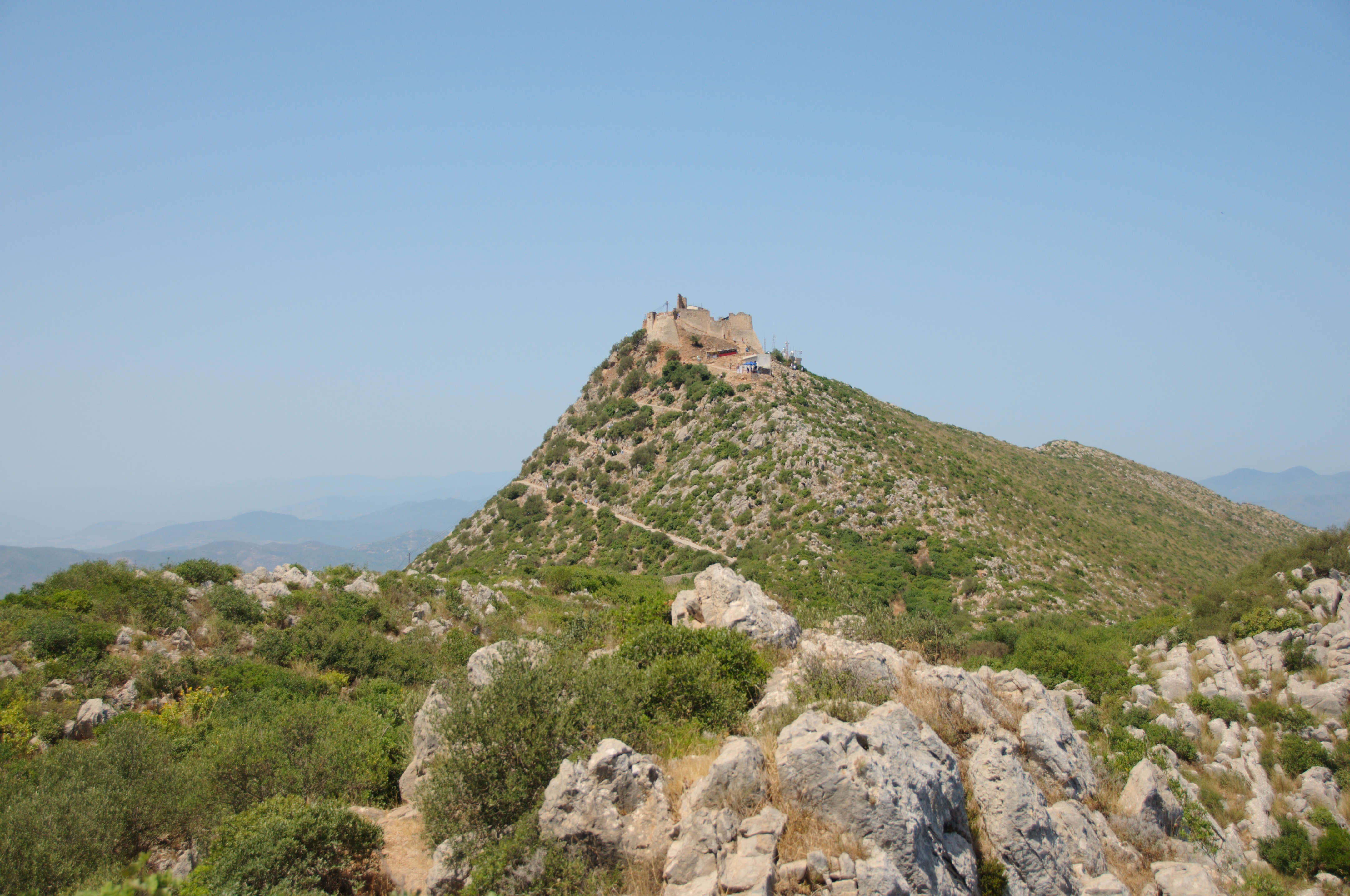 Yemma Gouraya, près de Béjaïa